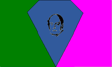 Bandera del municipio Andrés Bello. Estado Trujillo. Venezuela